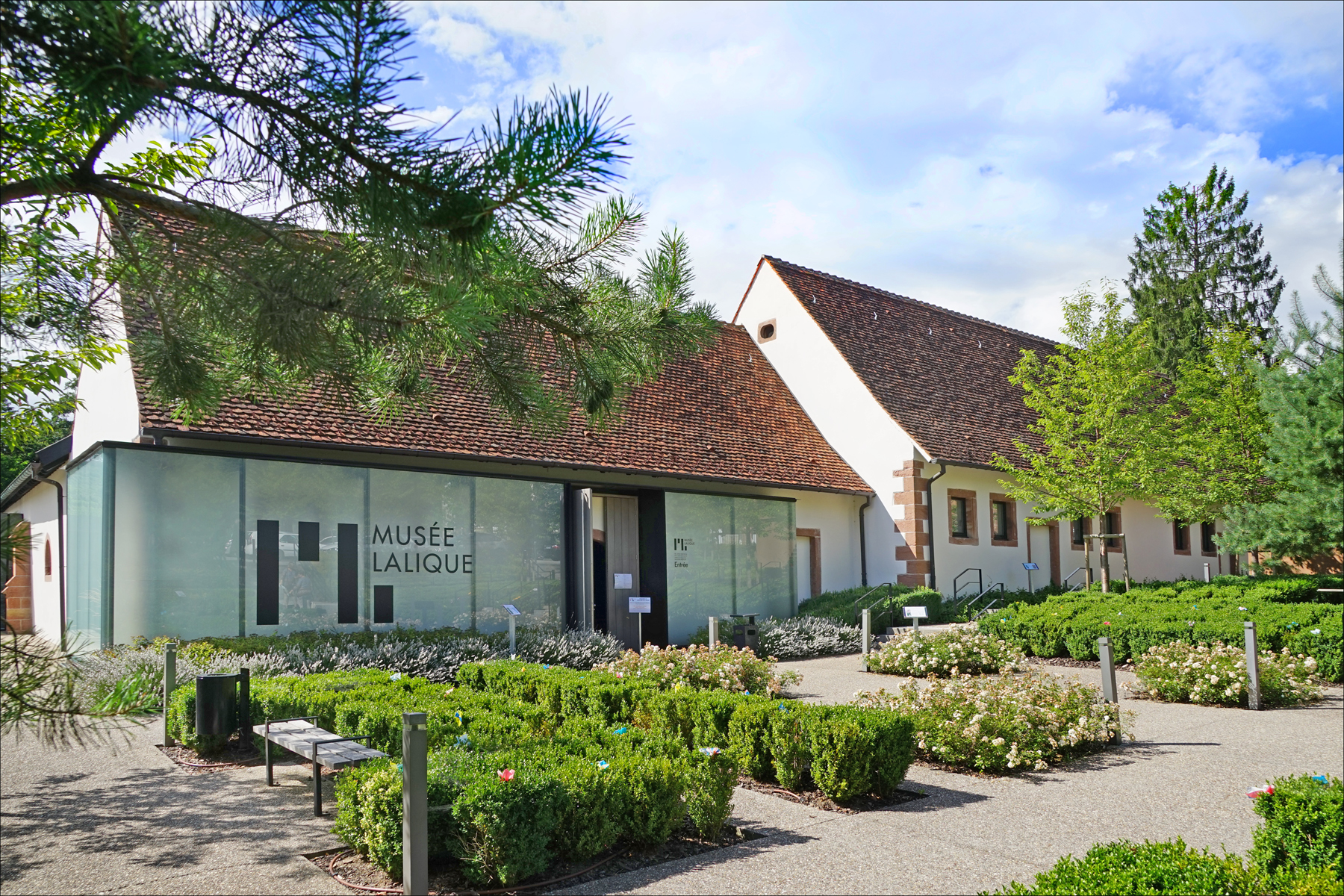 L'entrée du musée Lalique (Wingen-sur-Moder en Alsace) Le musée Lalique a ouvert en juillet 2011. Il est situé sur le site verrier du Hochberg à Wingen-sur-Moder à proximité d'une usine ouverte par René Lalique en 1921. Un bâtiment nouveau a été construit pour étendre les espaces consacrés au musée. Le réaménagement a été réalisé par l'agence Wilmotte.